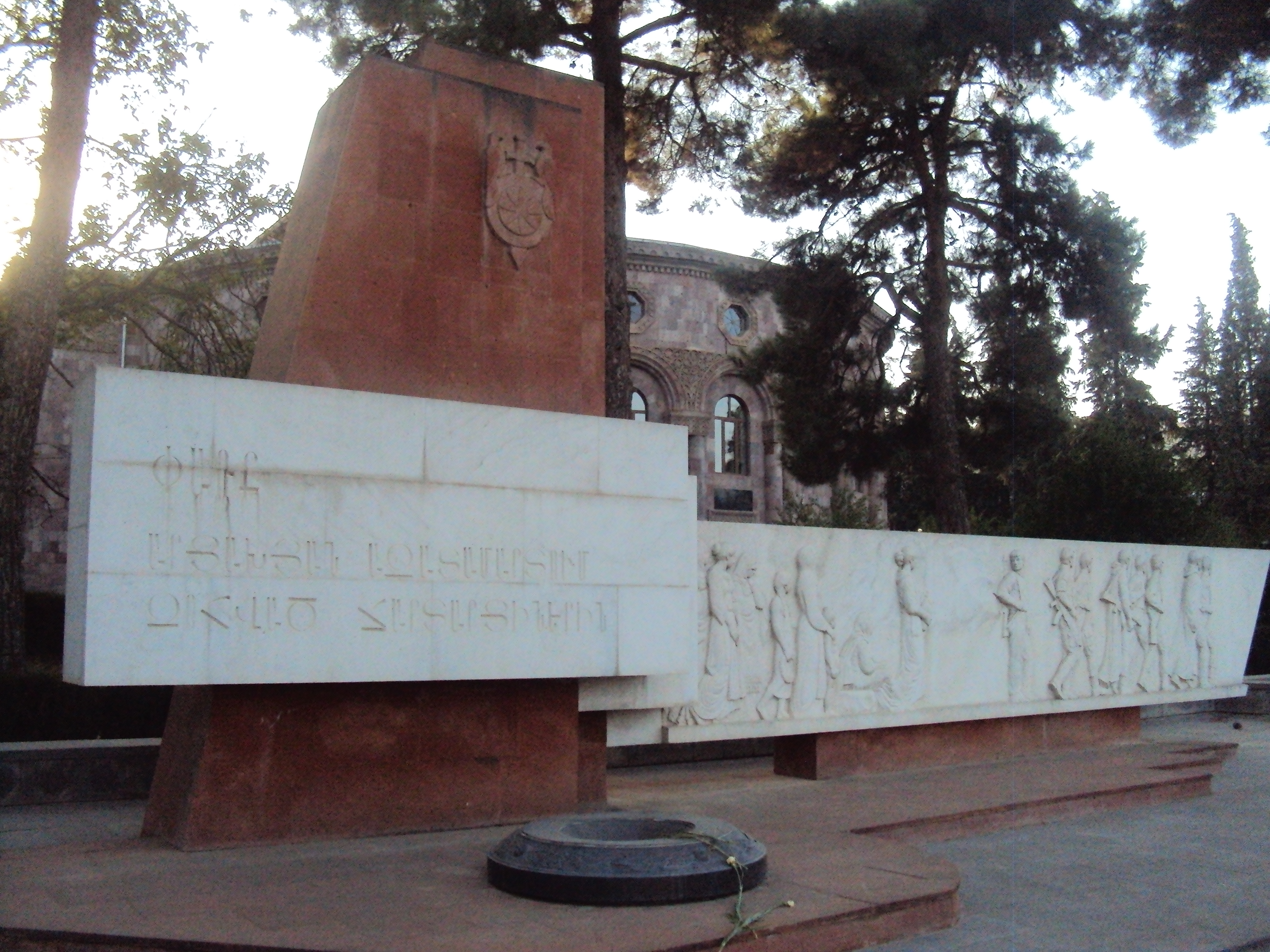 Արցախյան ազատամարտում զոհված նահատակների հուշարձան